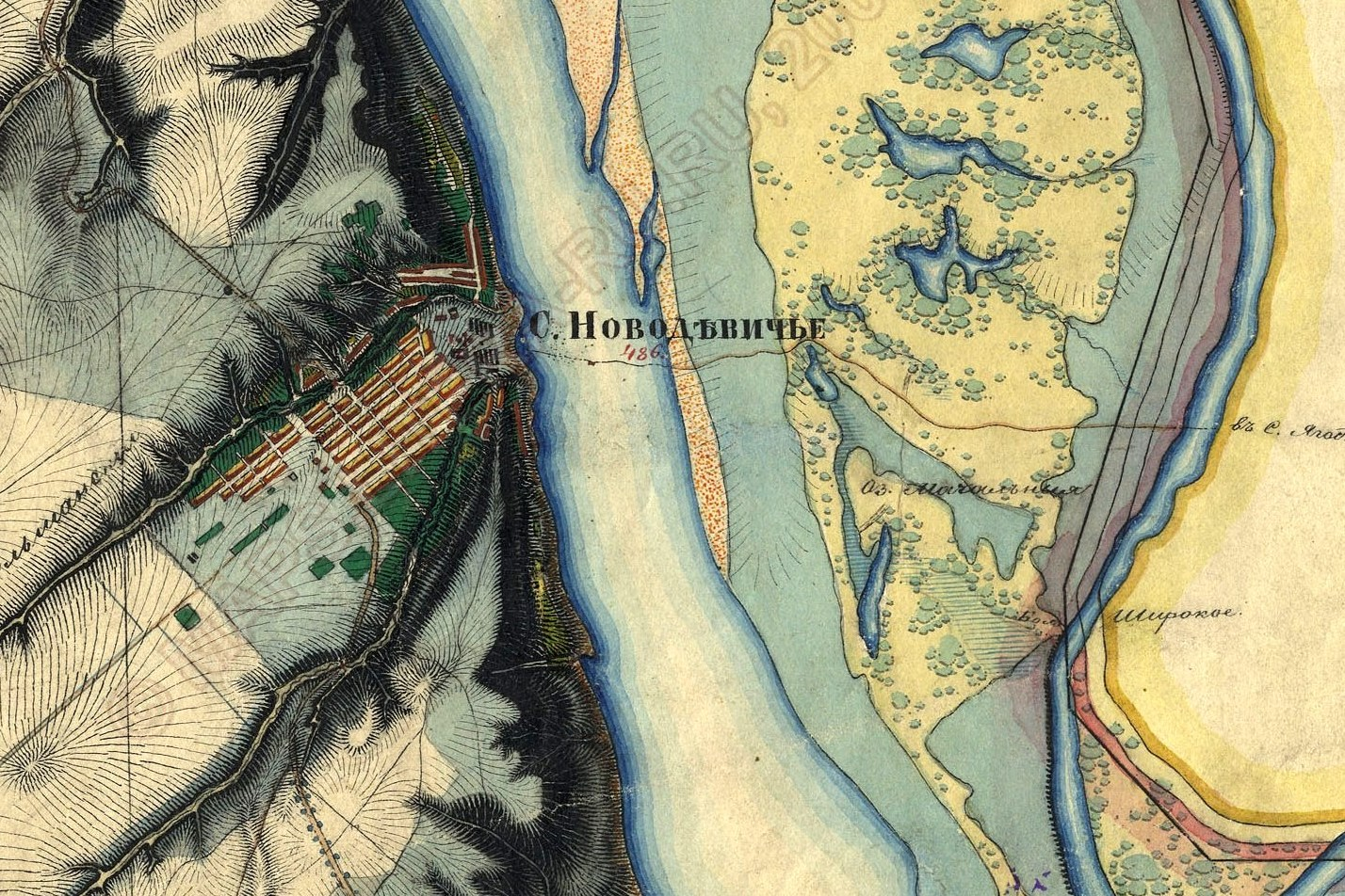 Фрагмент топографической карты 1859 года